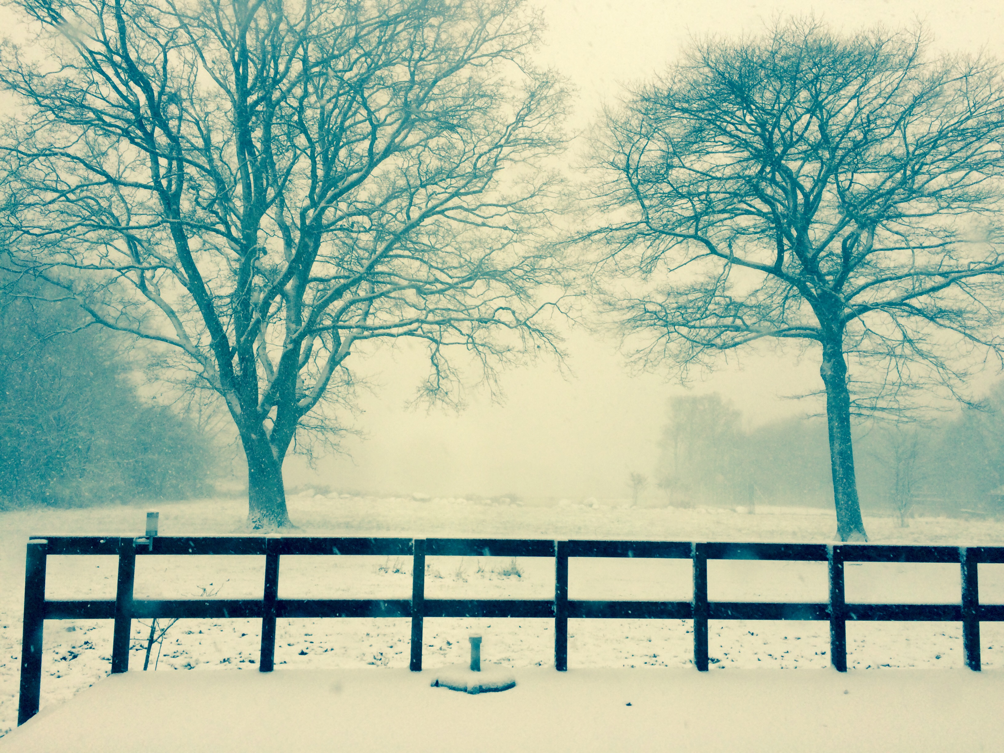 Garden view